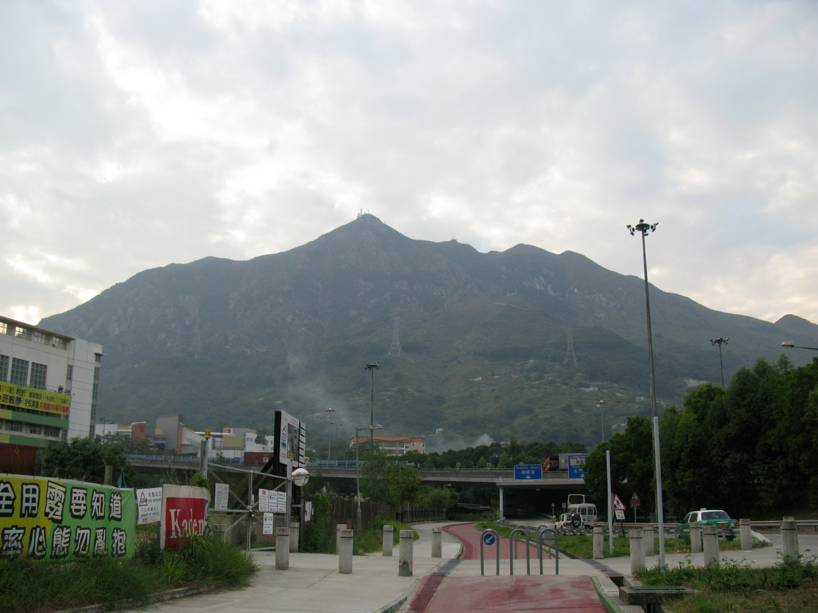 青山 Castle Peak